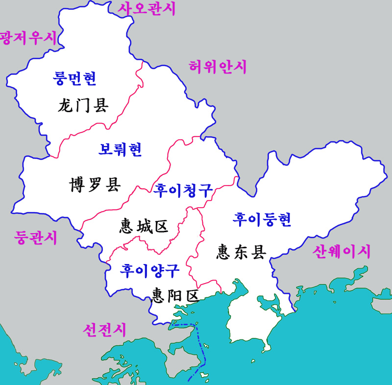 후이저우 현급행정구역